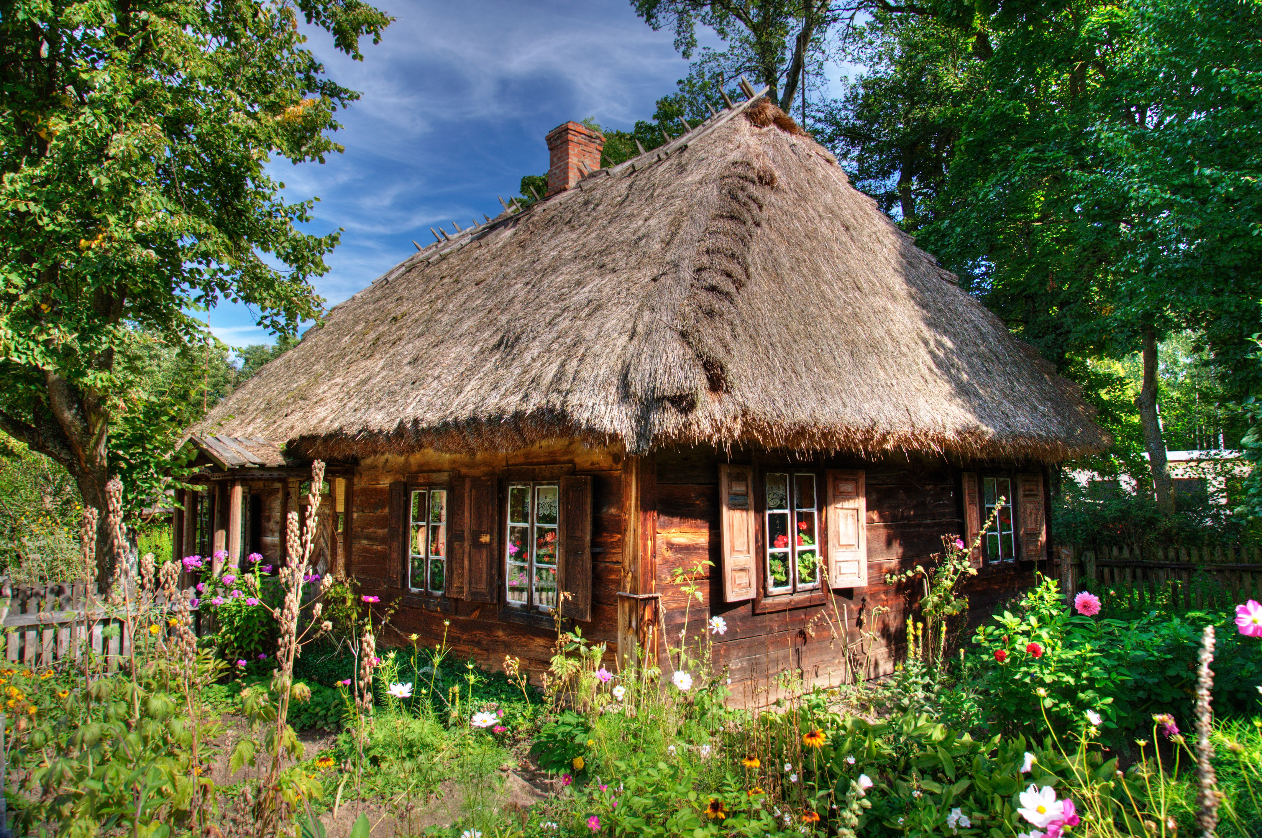 Chałupa w Muzeum Rolnictwa w Ciechanowcu